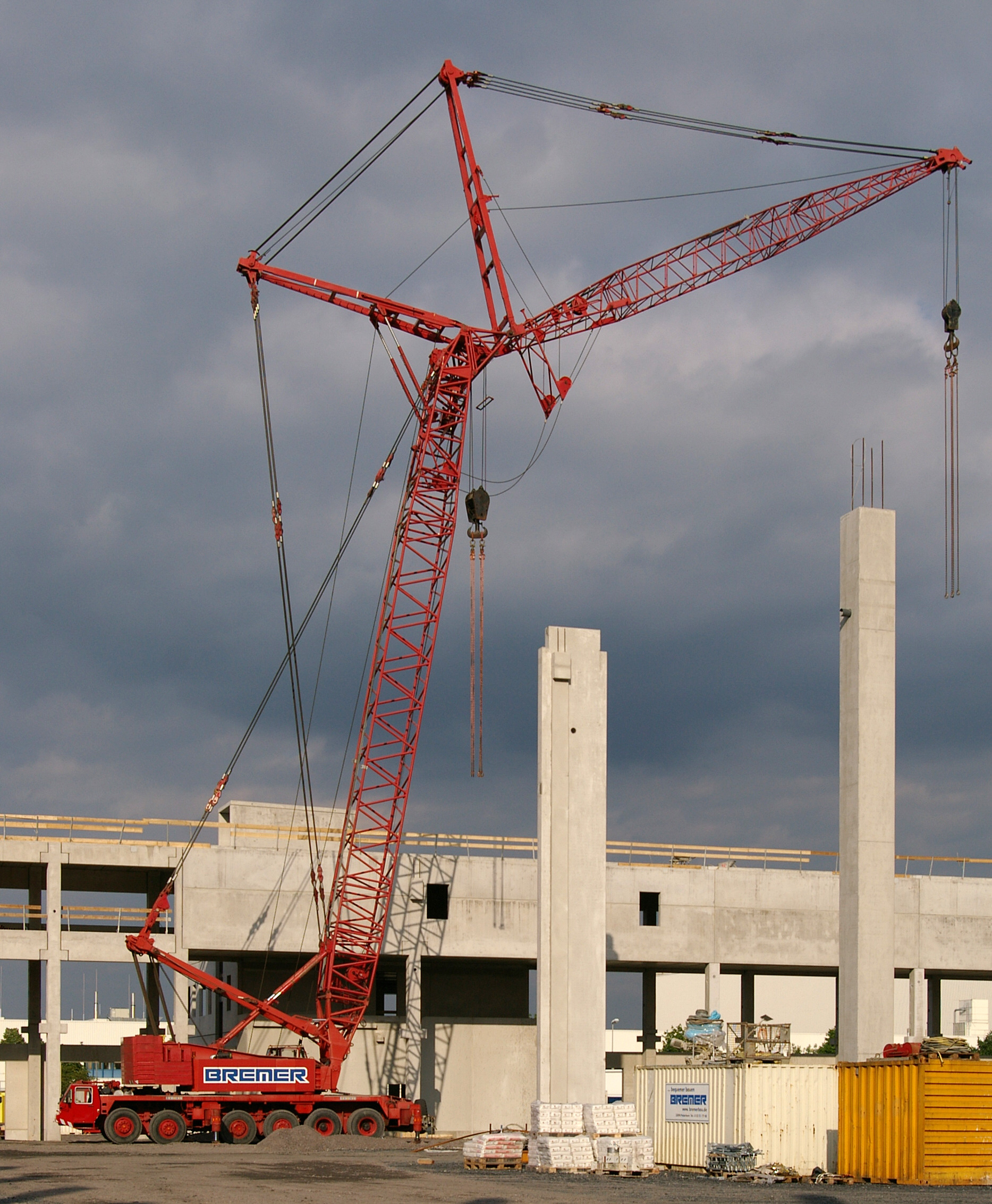 Gittermastkran auf der Baustelle des neuen DHL-Warenverteilzentrums in Unna